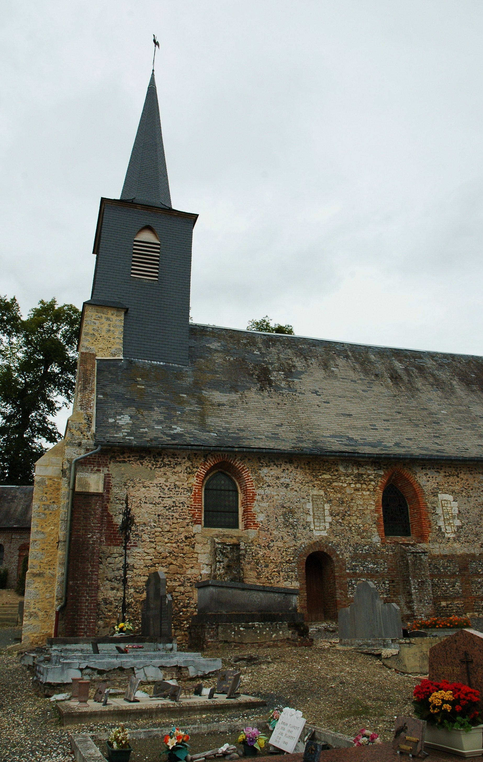 Tœufles (Somme, France). L'église Saint-Valery.